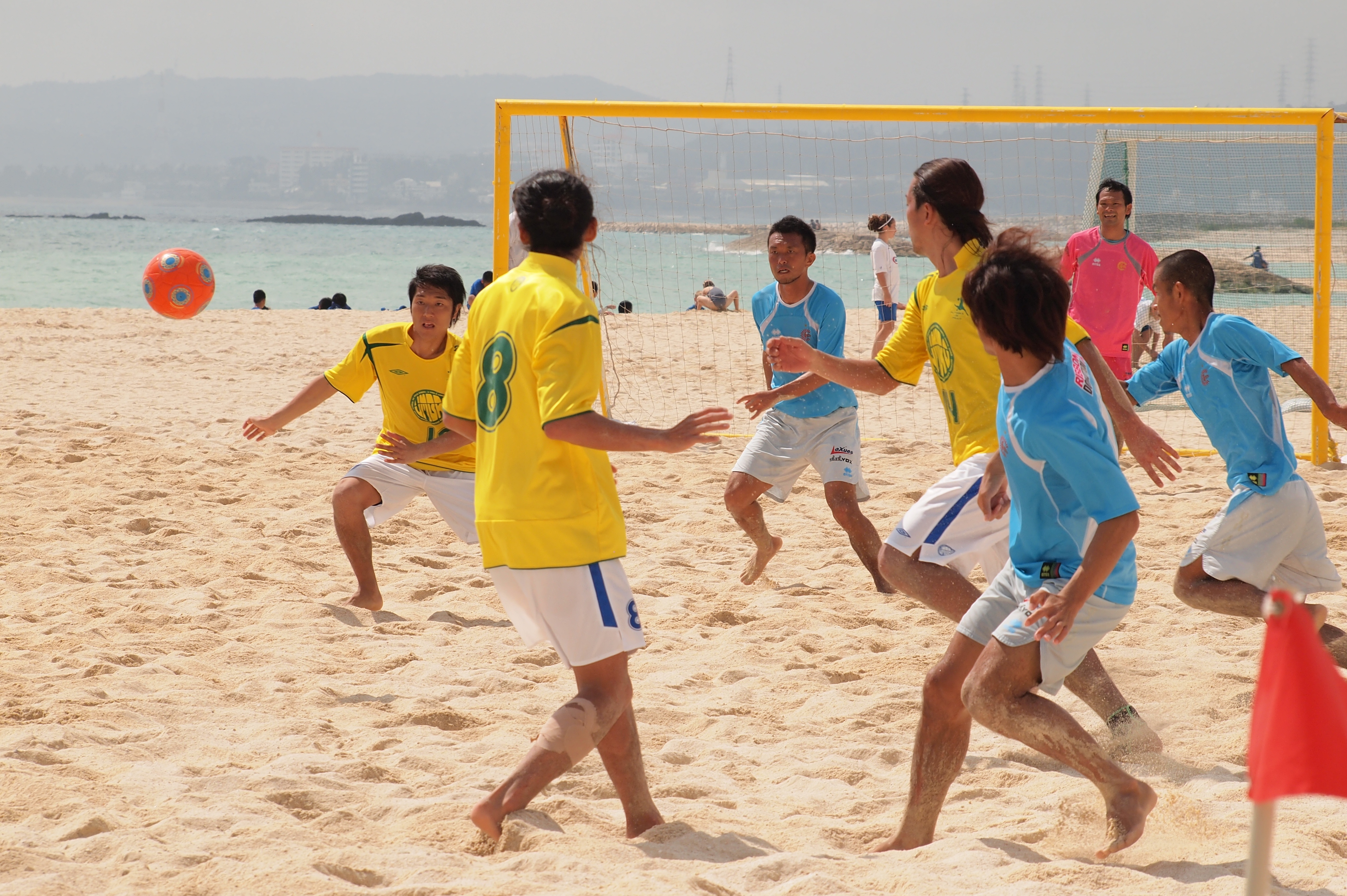 沖縄県金武町で毎年3月に開催されるビーチサッカーフェスティバル。第5回大会決勝戦の様子（オッタマ・ゲータvsソーマプライア）